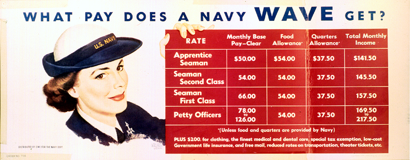 Recruitment Poster for WAVES